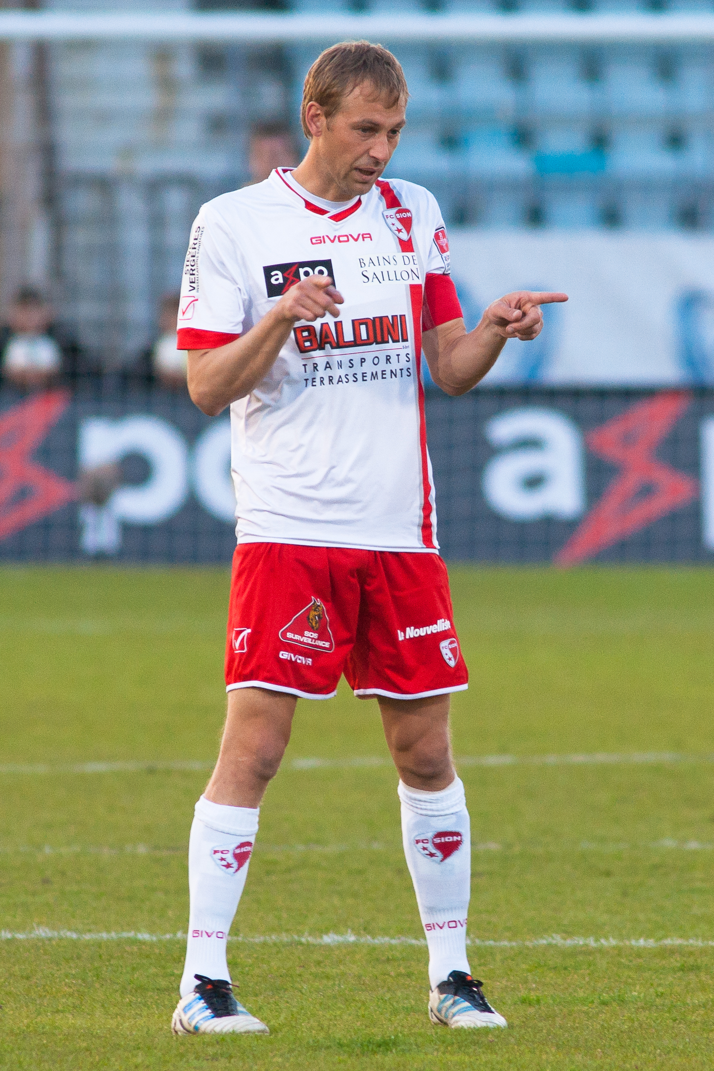 Goran Obradovic - Lausanne vs Sion 02 may 2012